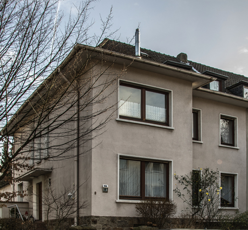 Stolpersteine für Dr. Alber Katz. Er wohnte in dem Haus Dreihuettenstraße 8